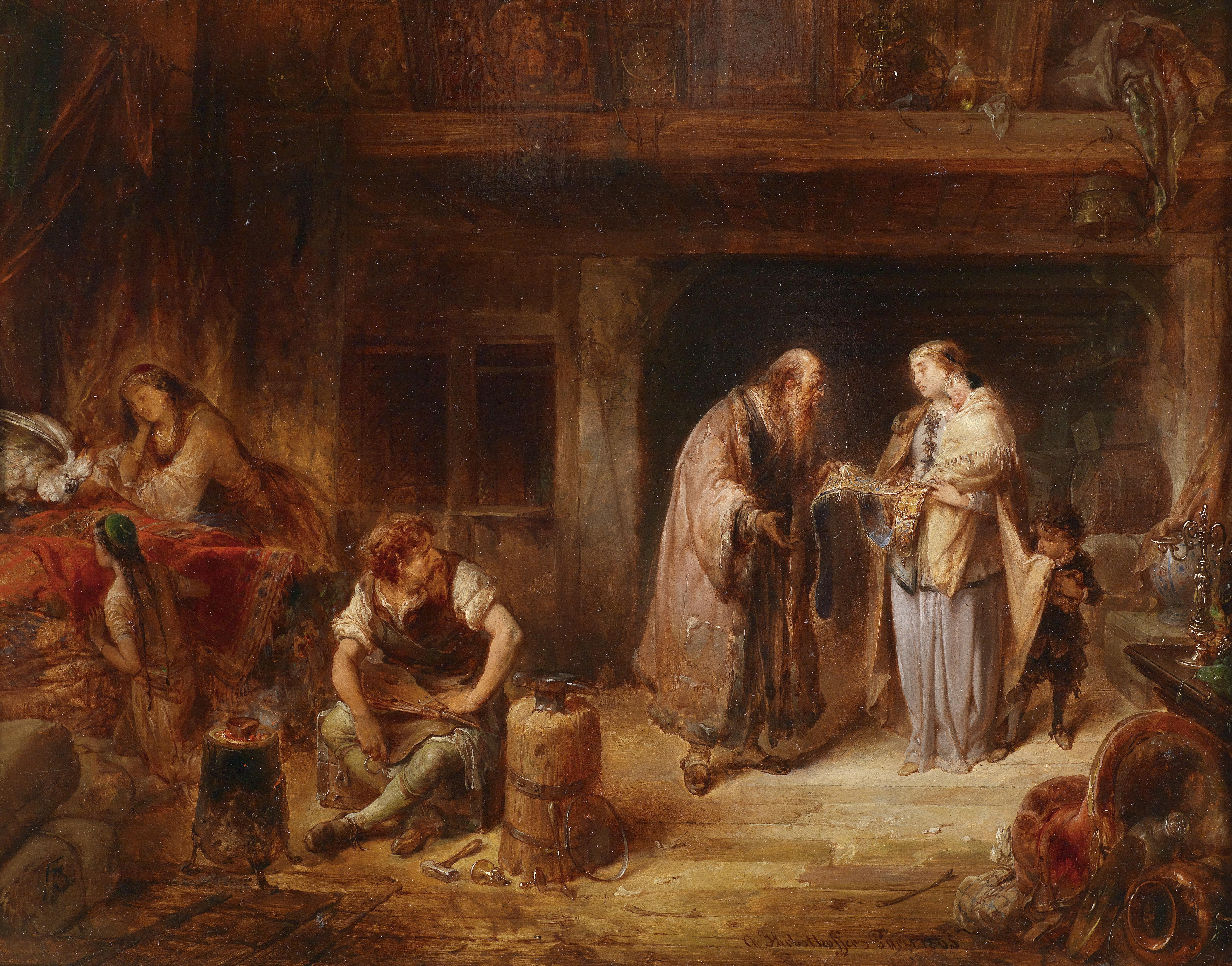 Der Händler